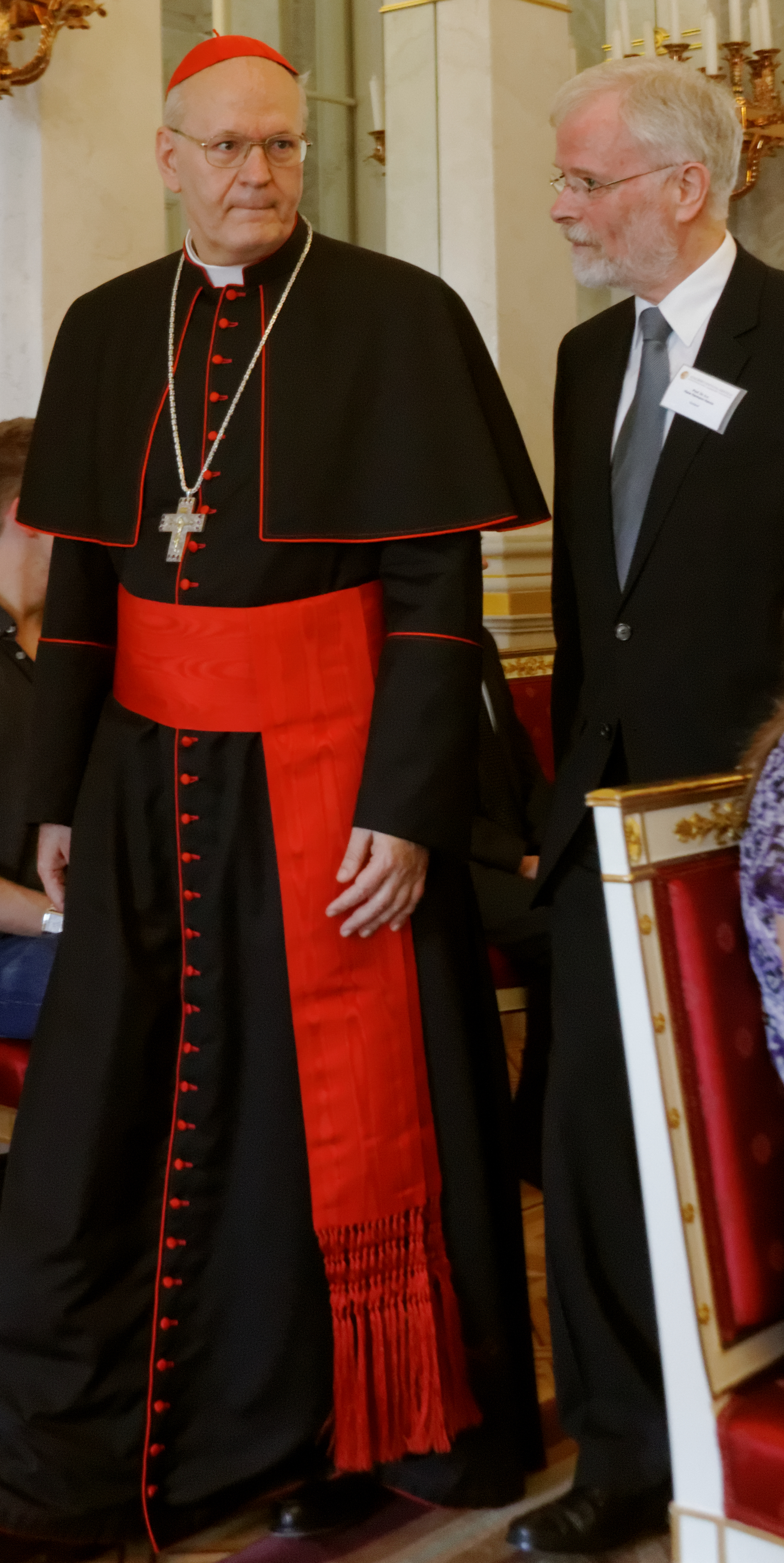 Prof. Hans Hermann Henrix im Gespräch mit Peter Kardinal Erdö, Sandor Palais Budapest 2013